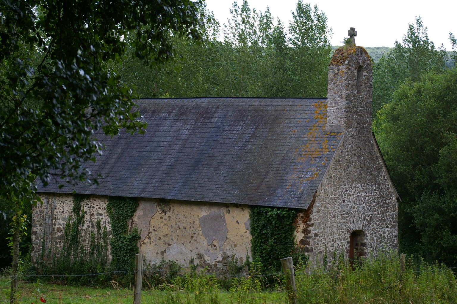 Chapelle Saint-Nicolas à torcé-Viviers-en-Charnie (53)